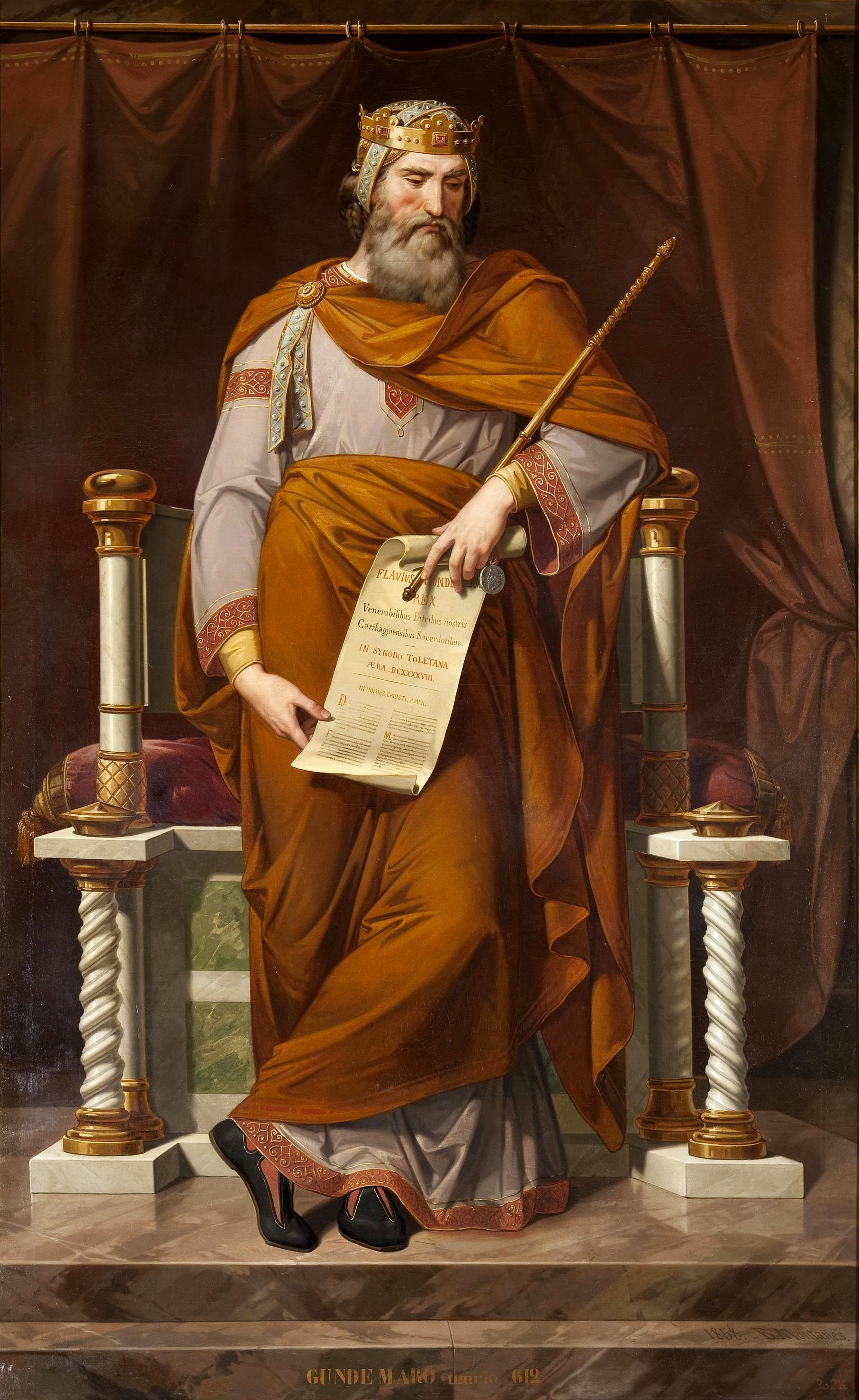 Retrato imaginario del rey visigodo Gundemaro († 612), que sucedió en el trono a Witerico y fue sucedido a su vez por Sisebuto.